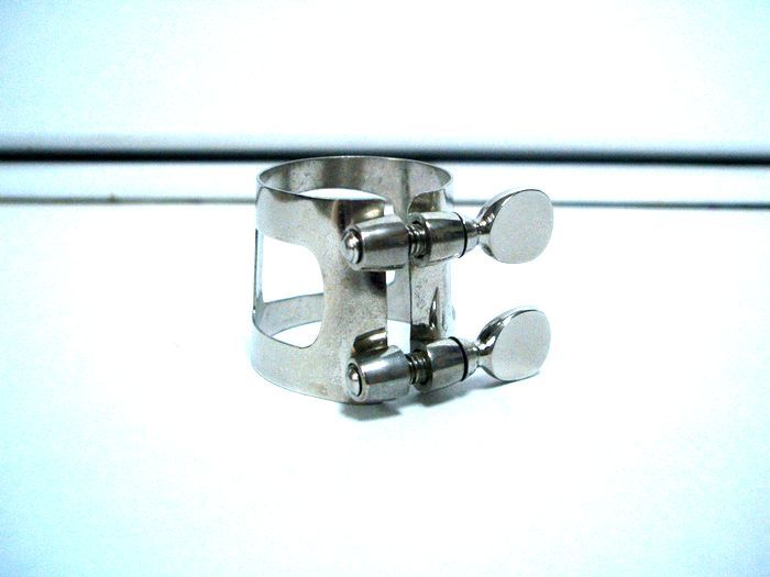 ClarinetLigature